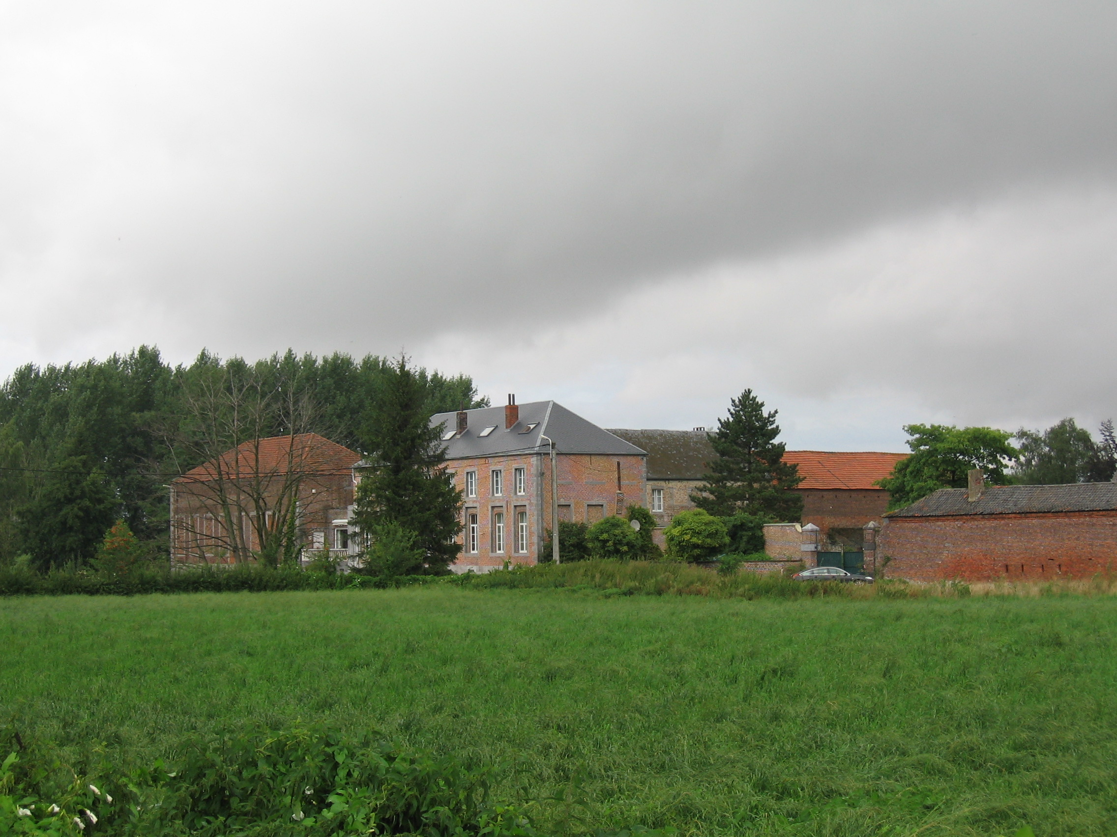 Ancien palais abbatial de Boneffe (aujourd'hui: ferme)